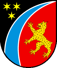 Wappen von Luchsingen Kanton Glarus Schweiz